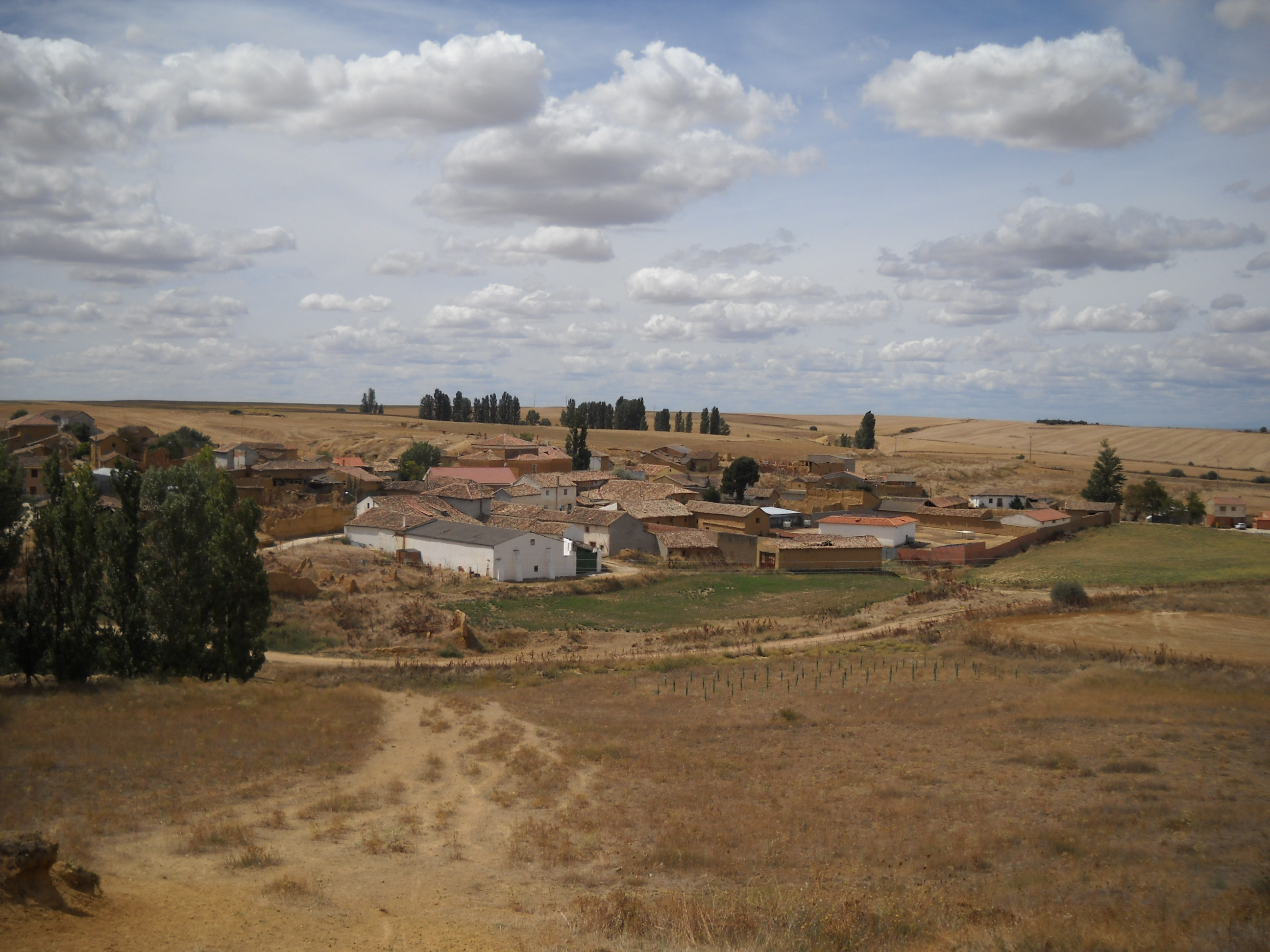 ayuntamiento de fontihoyuelo